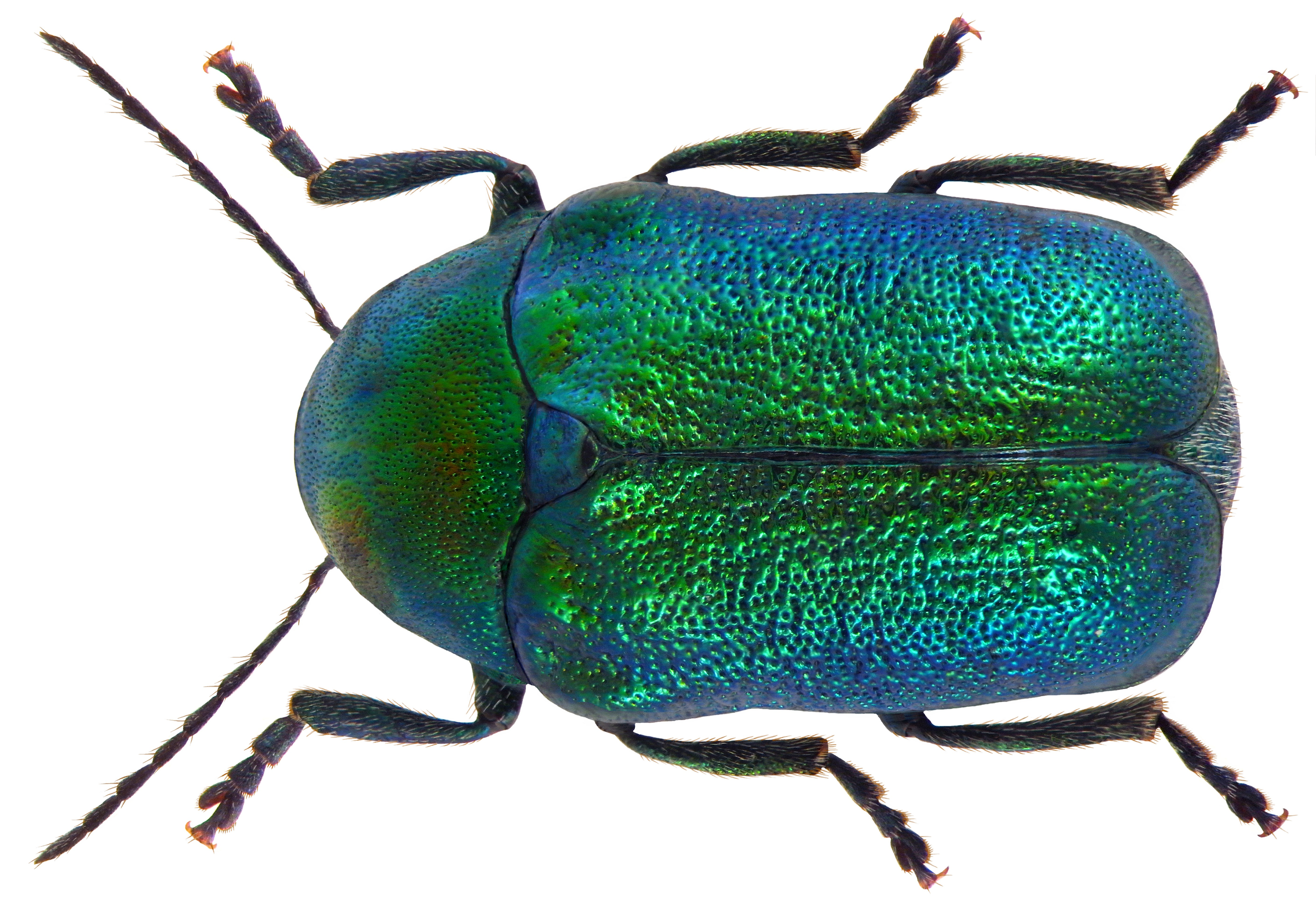 Cryptocephalus aureolus Suffrian, 1847 Familie: Chrysomelidae Groesse: 6-7 mm Verbreitung: Europa Ökologie: auf gelbblühenden Compositen Fundort: Germania, Bayern, Oberfranken, Kasendorf leg.det. U.Schmidt, 1973 Photo: U.Schmidt, 2010